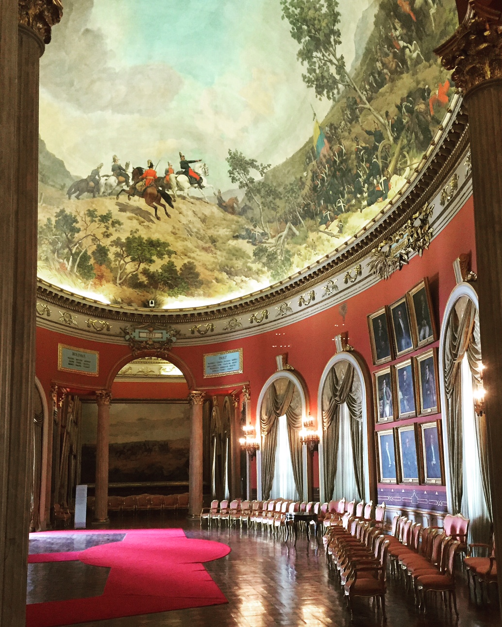 Salón Elíptico del Palacio Federal Legislativo. Caracas, Venezuela.